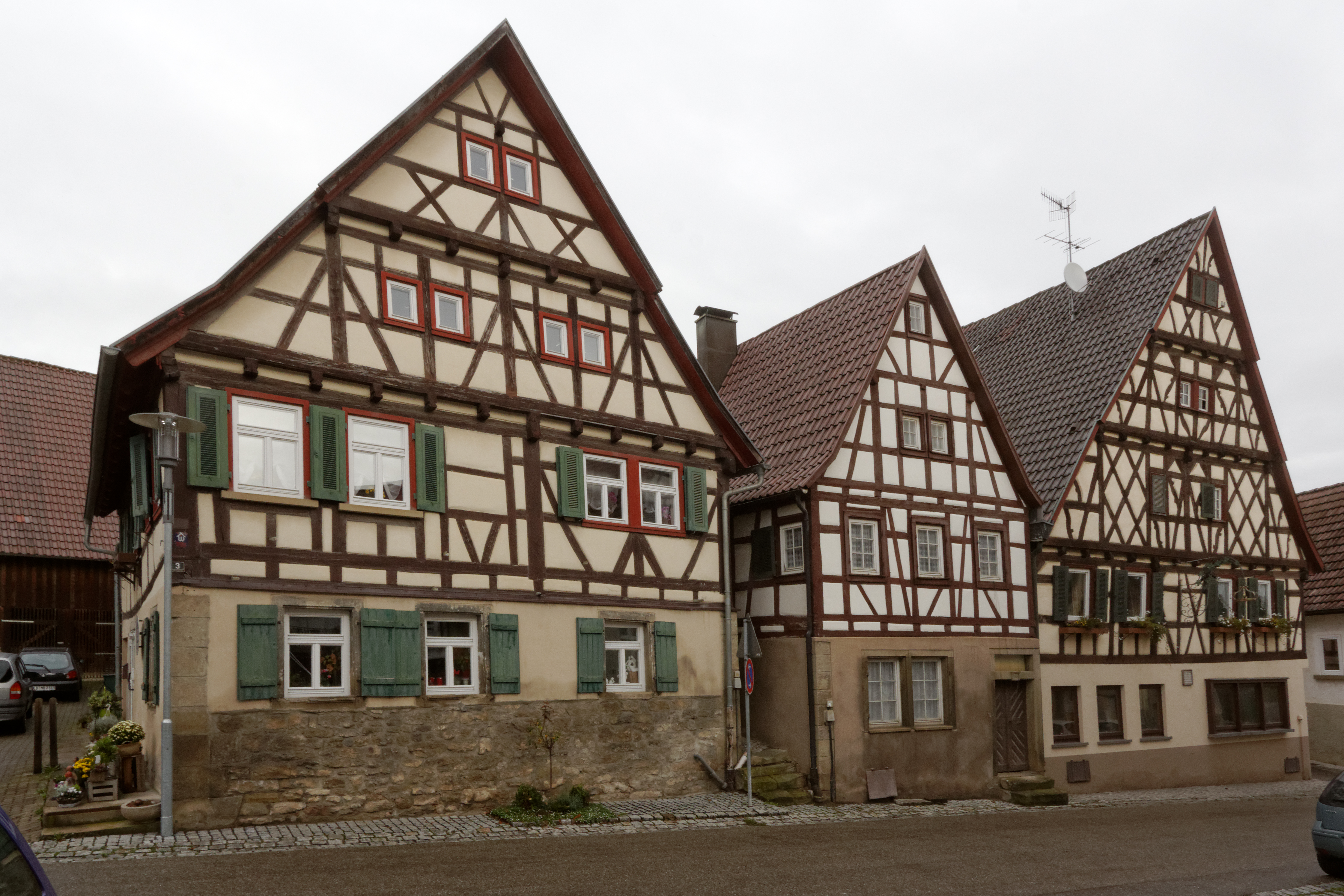 Drei Fachwerkhäuser in Roßwag, einem Stadtteil von Vaihingen an der Enz.